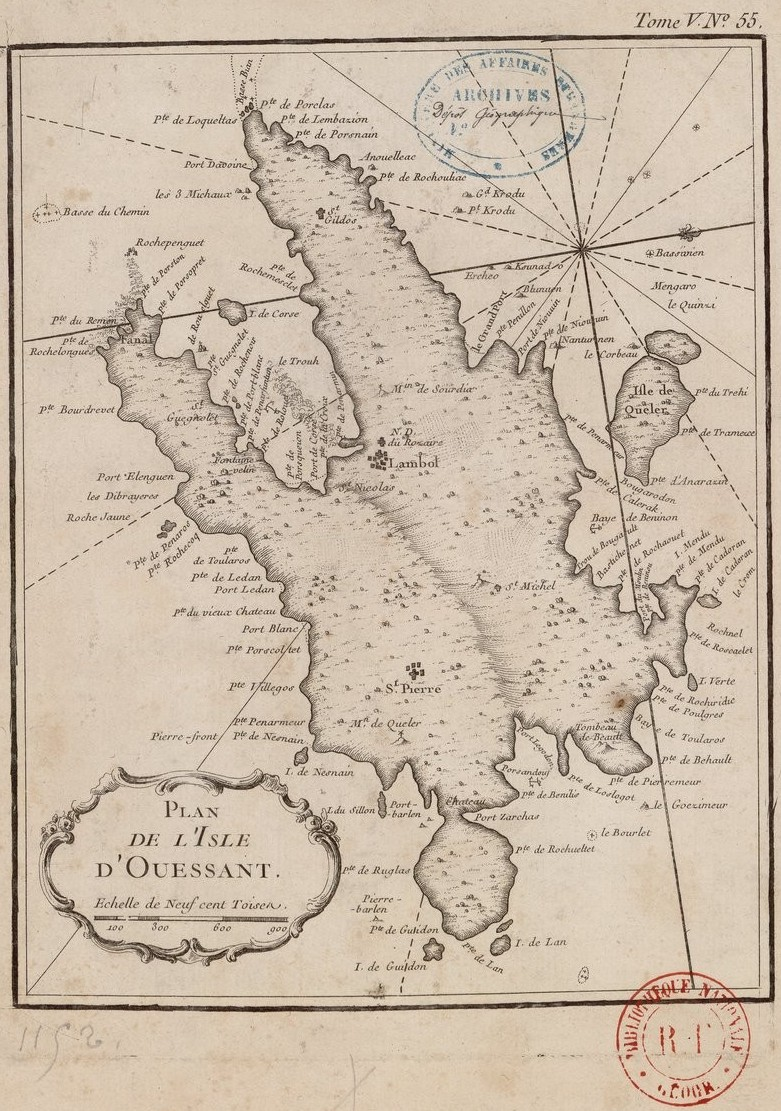 Plan de l'île d'Ouessant en 1764 (Bellin